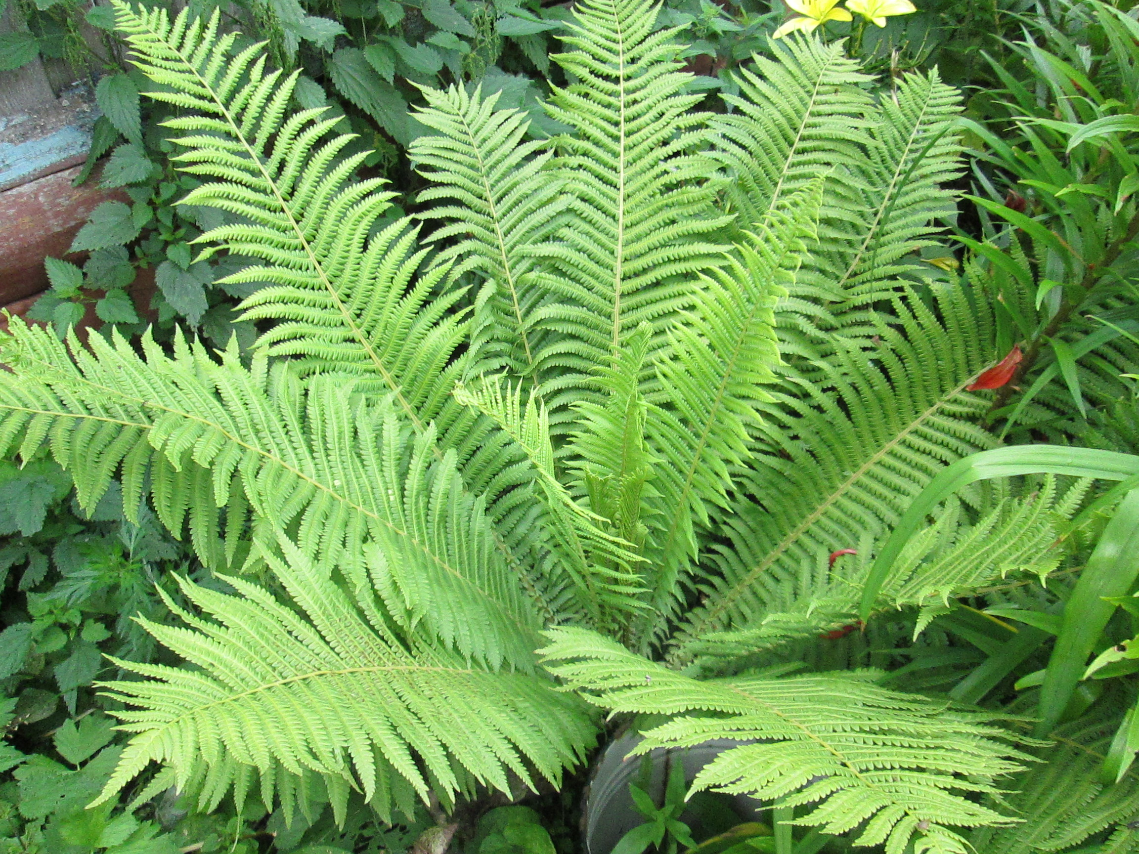 Папоротник растущий дома